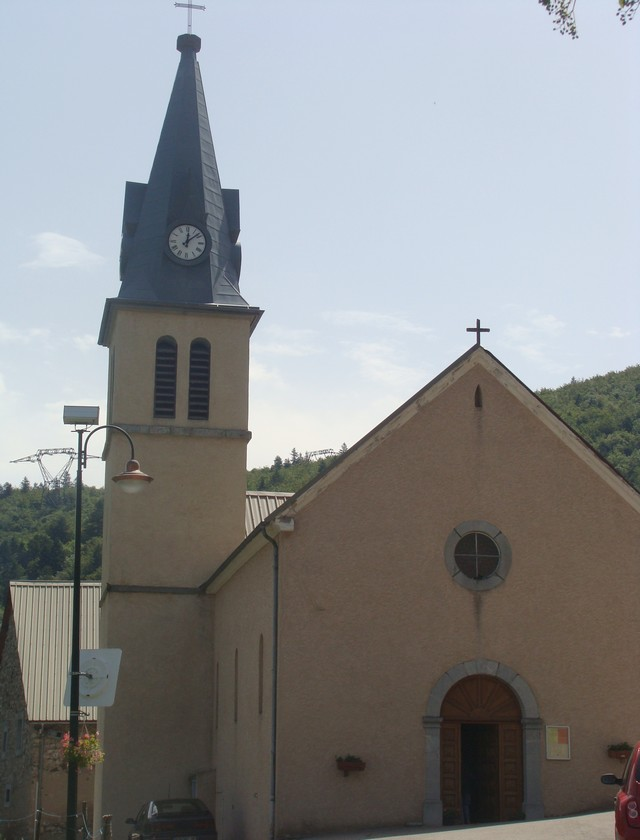 L'église de Beaufin, vue extérieure. Le clocher, sur base carrée, est accolé à la nef à la hauteur du chœur. La façade, sobre, comporte un petit œil-de-bœuf.